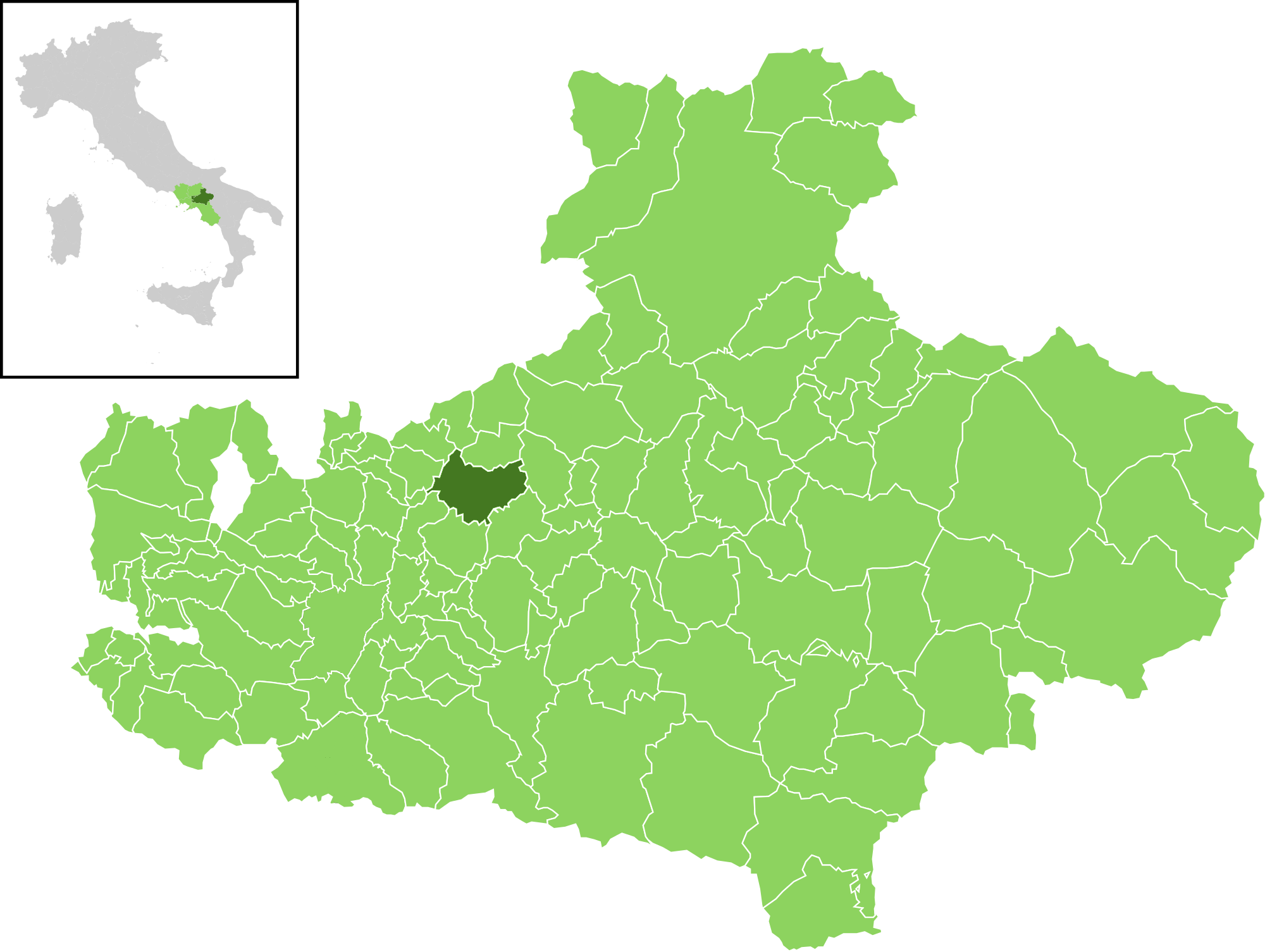 Posizione del comune all'interno della provincia di Avellino